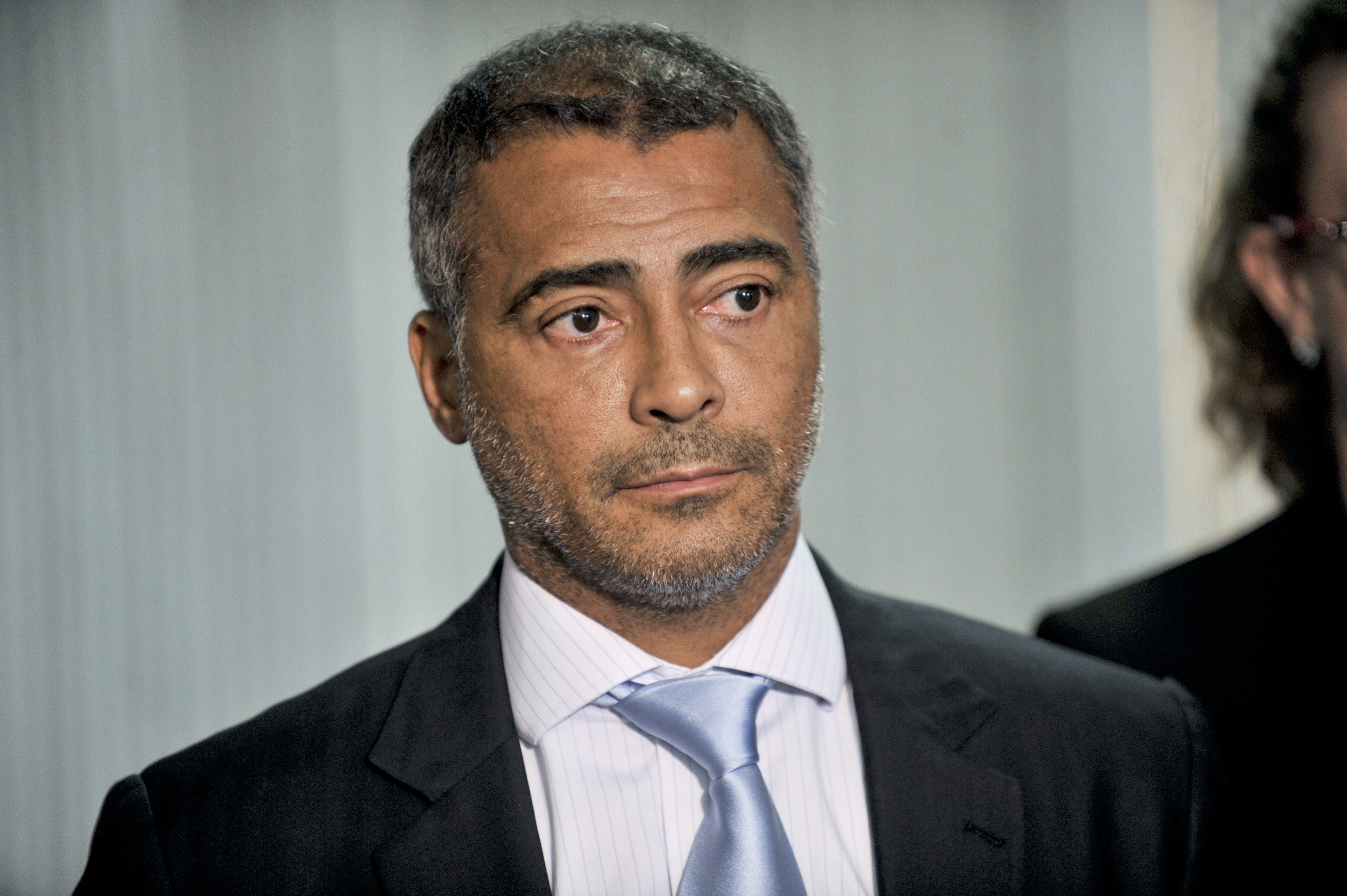 Senador Romário (PSB-RJ) concede entrevista. Foto: Waldemir Barreto/Agência Senado